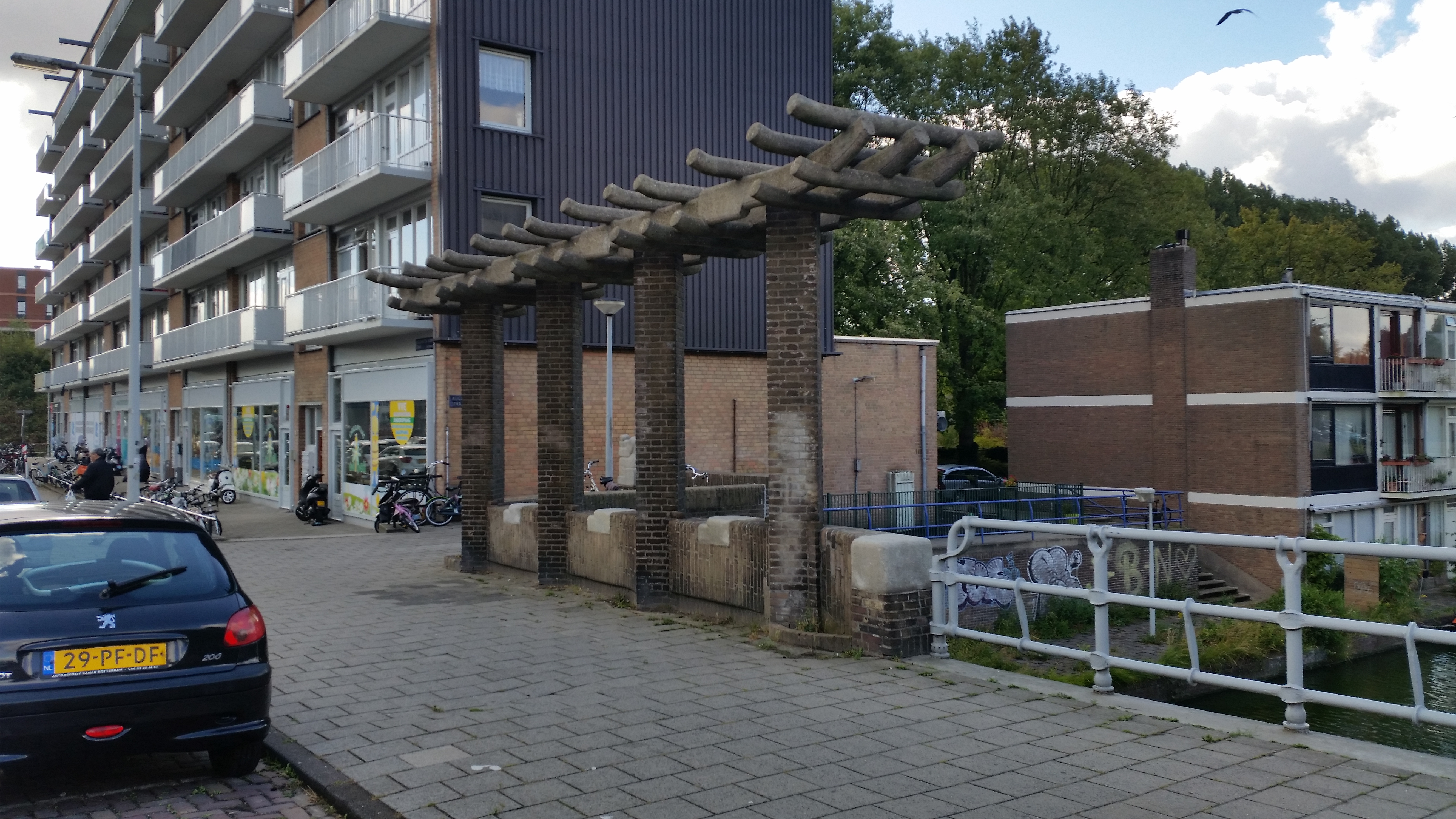 Brug 604 (in Amsterdam), bijna lege pergola met de "bananen" erop